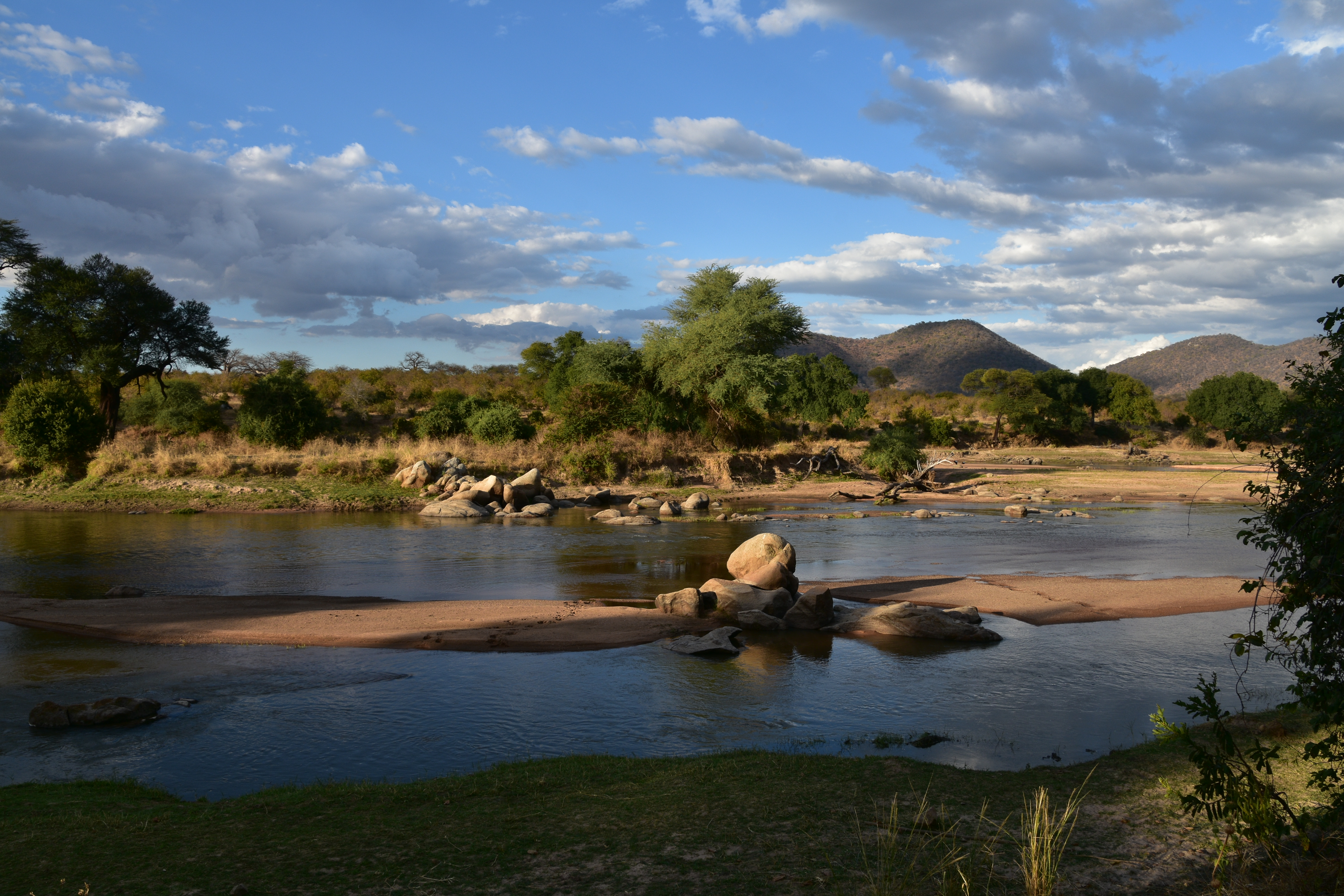 Ruaha River, Ruaha National Park (1)